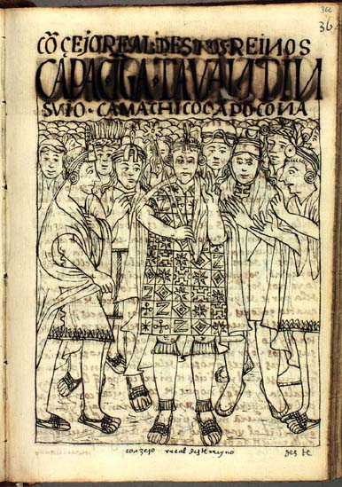 El Inca rodeado de nobles representantes de los cuatro suyos